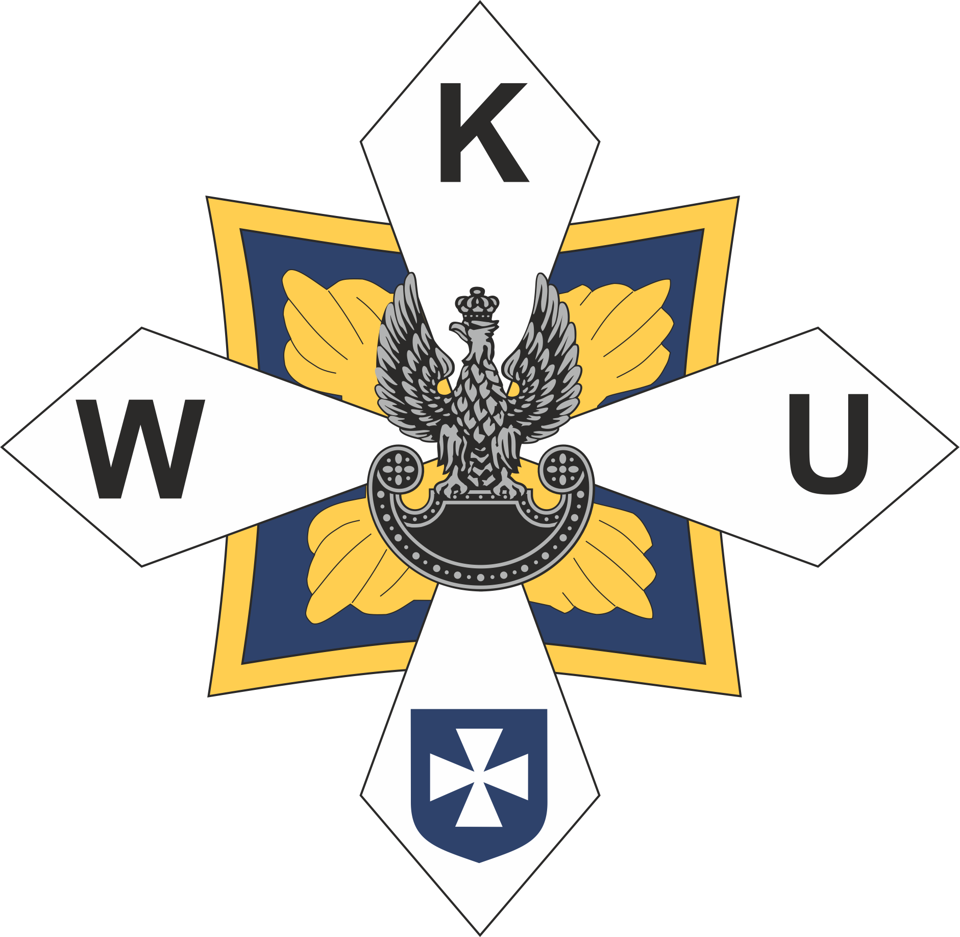 logo wku rzeszow